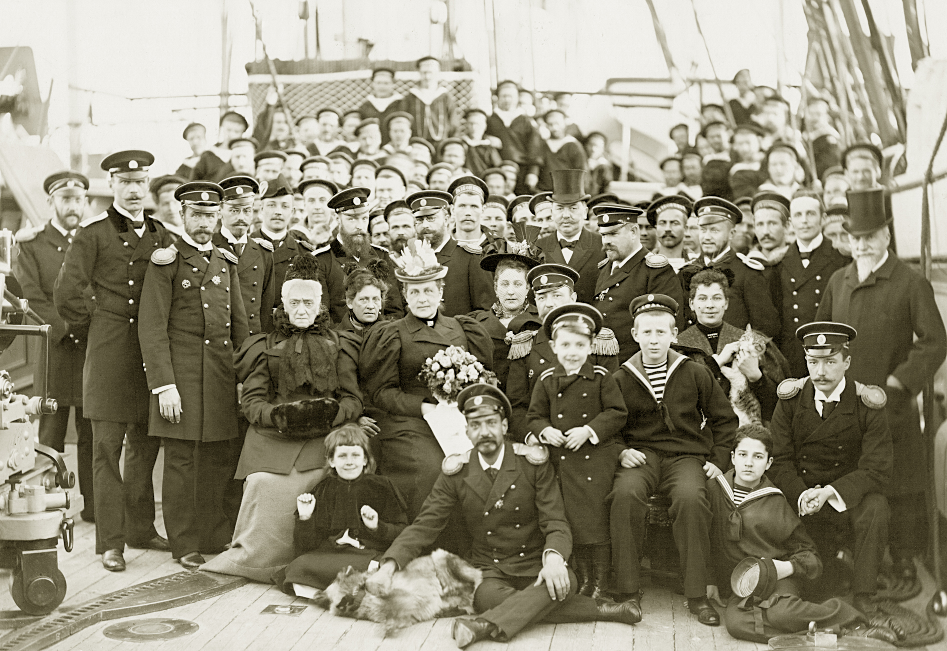 Королева эллинов великая княжна Ольга Константиновна (в центре) на борту крейсера «Разбойник». Стоит в первом ряду первым слева К. Ф. Шульц. Сидит первым справа Н. А. Волков Пирей, 1895 г.